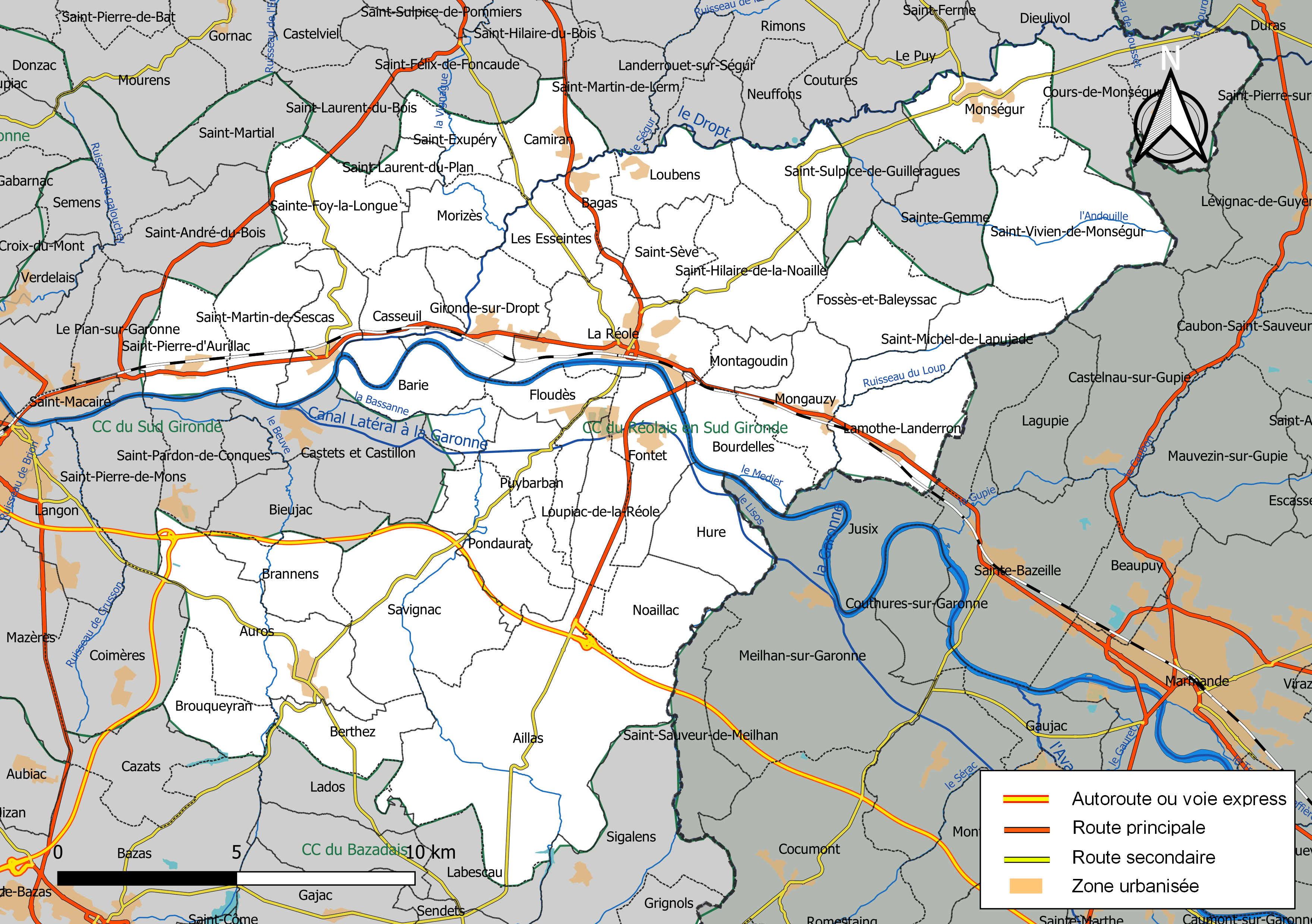 Carte géographique de la Communauté de communes du Réolais en Sud Gironde, département de la Gironde, France. Composition au 1er janvier 2019.